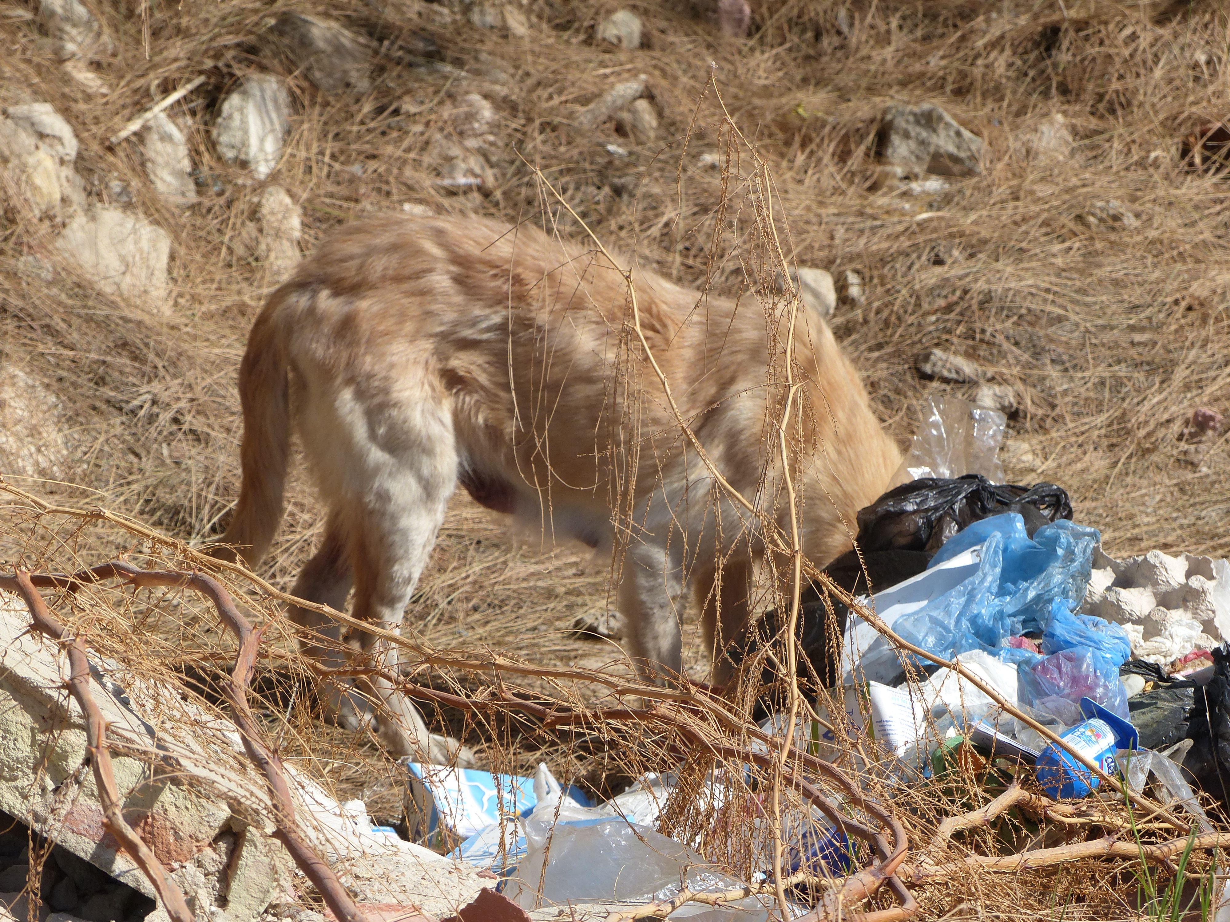 Chien errant fouillant dans des déchets, à Tozeur, Tunisie